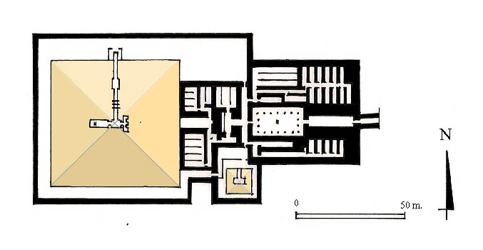 Plan du complexe funéraire d'Ouans à Saqqarah